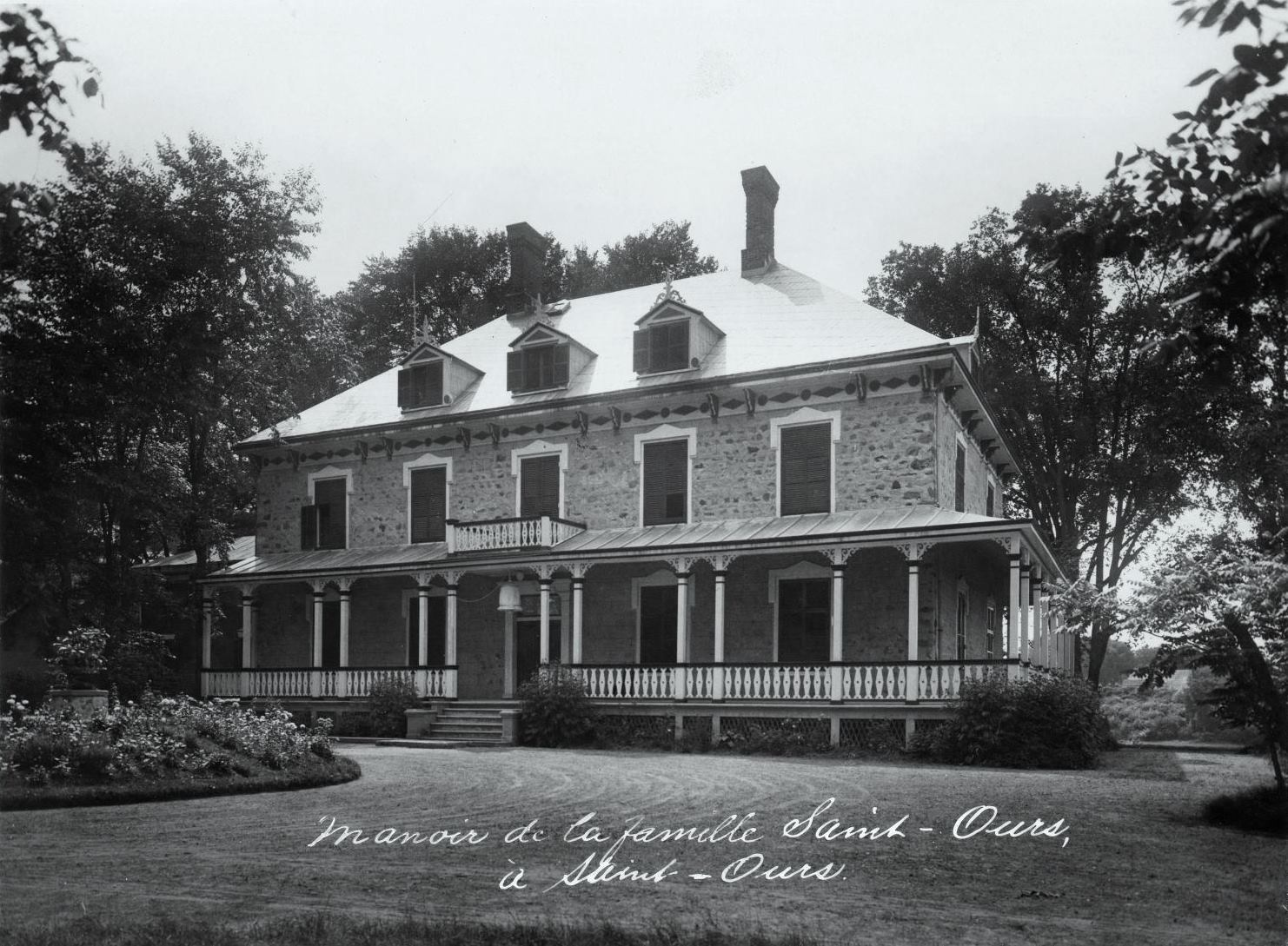 Manoir de la famille Saint-Ours, à Saint-Ours